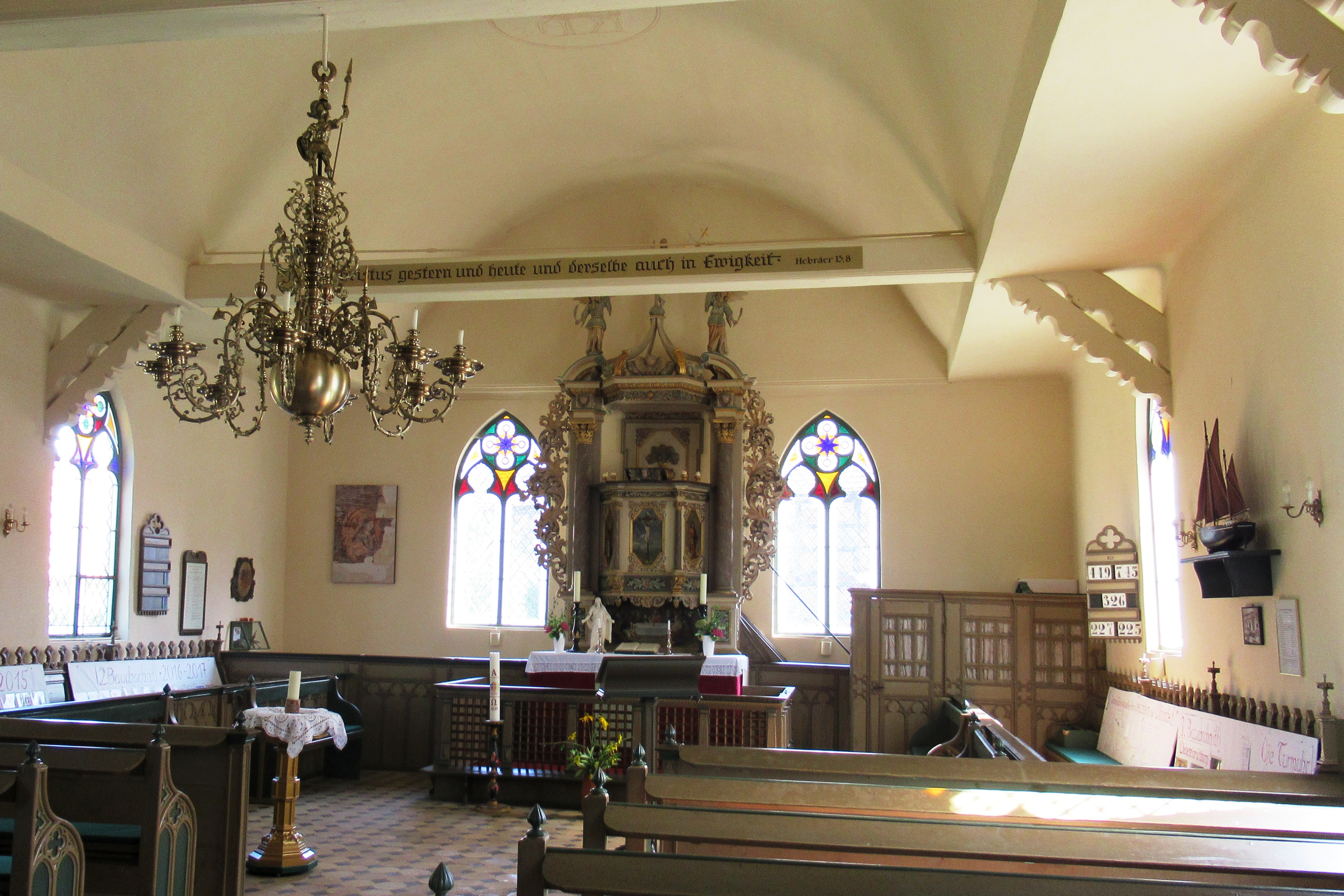 Kapelle Ludwigsburg (Mecklenburg-Vorpommern), Altarraum